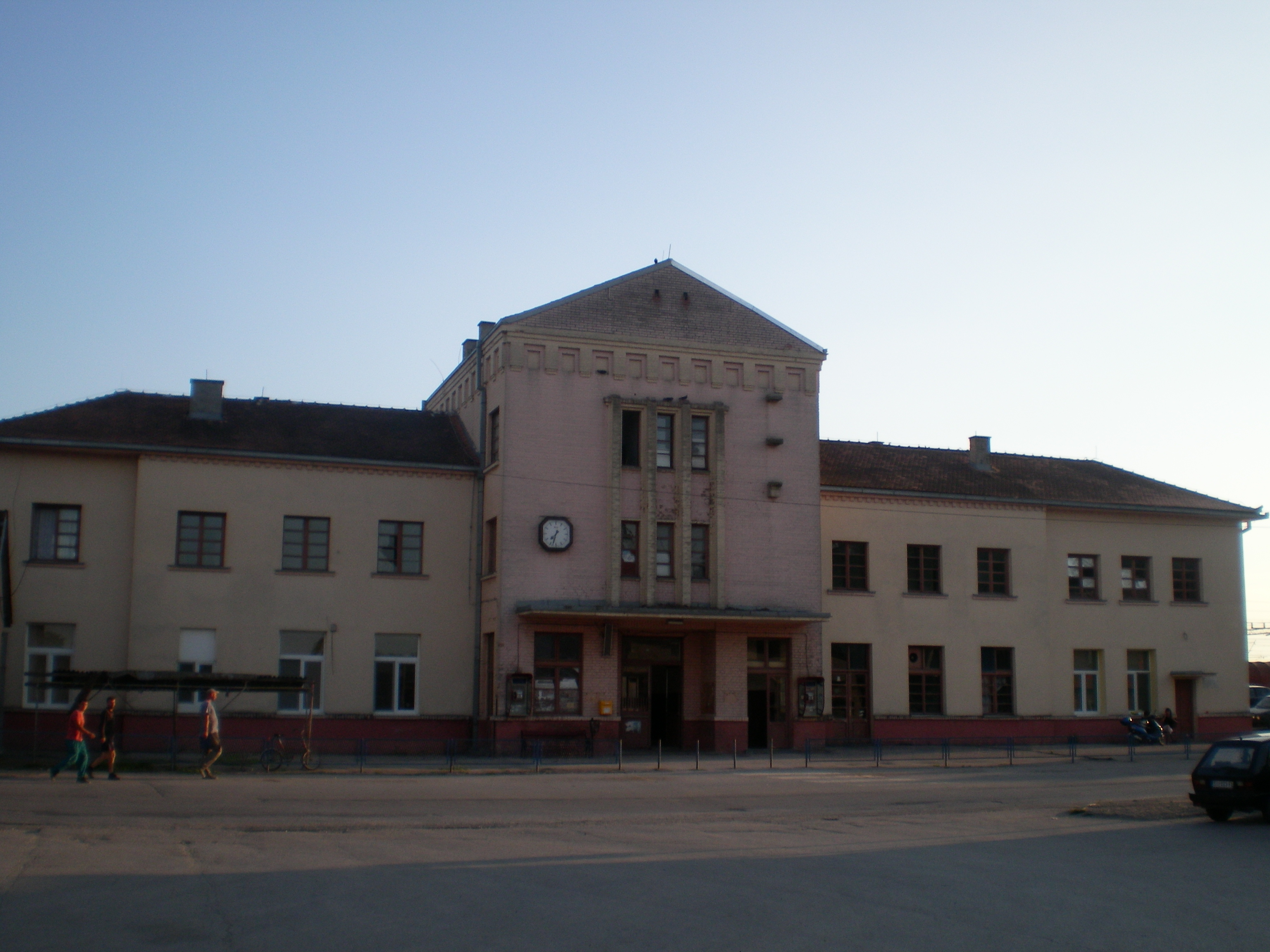 Budova nádraží Šid, Srbsko